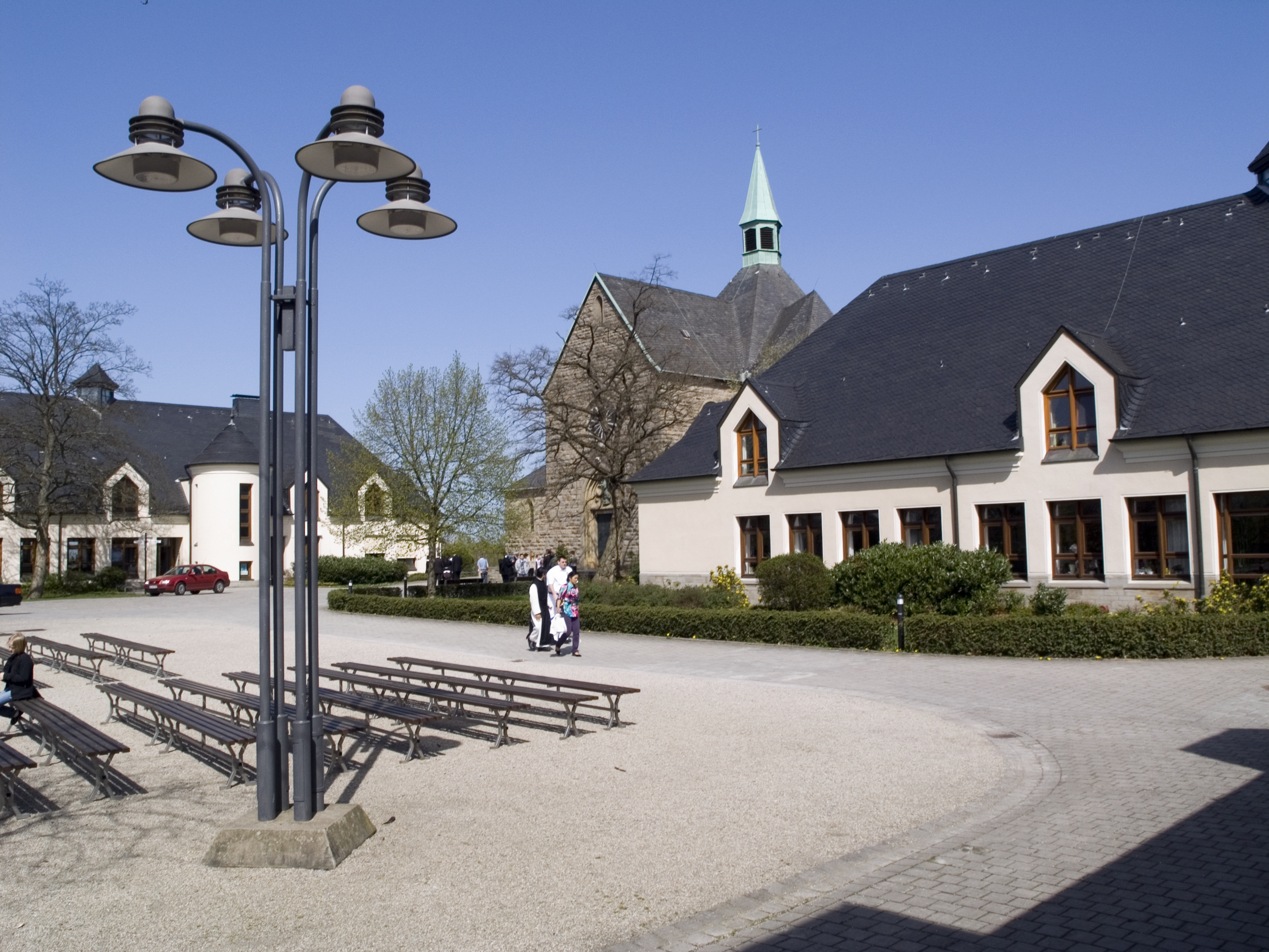 Северный Рейн - Вестфалия, Бохум - Цистерцианский монастырь в Штипеле